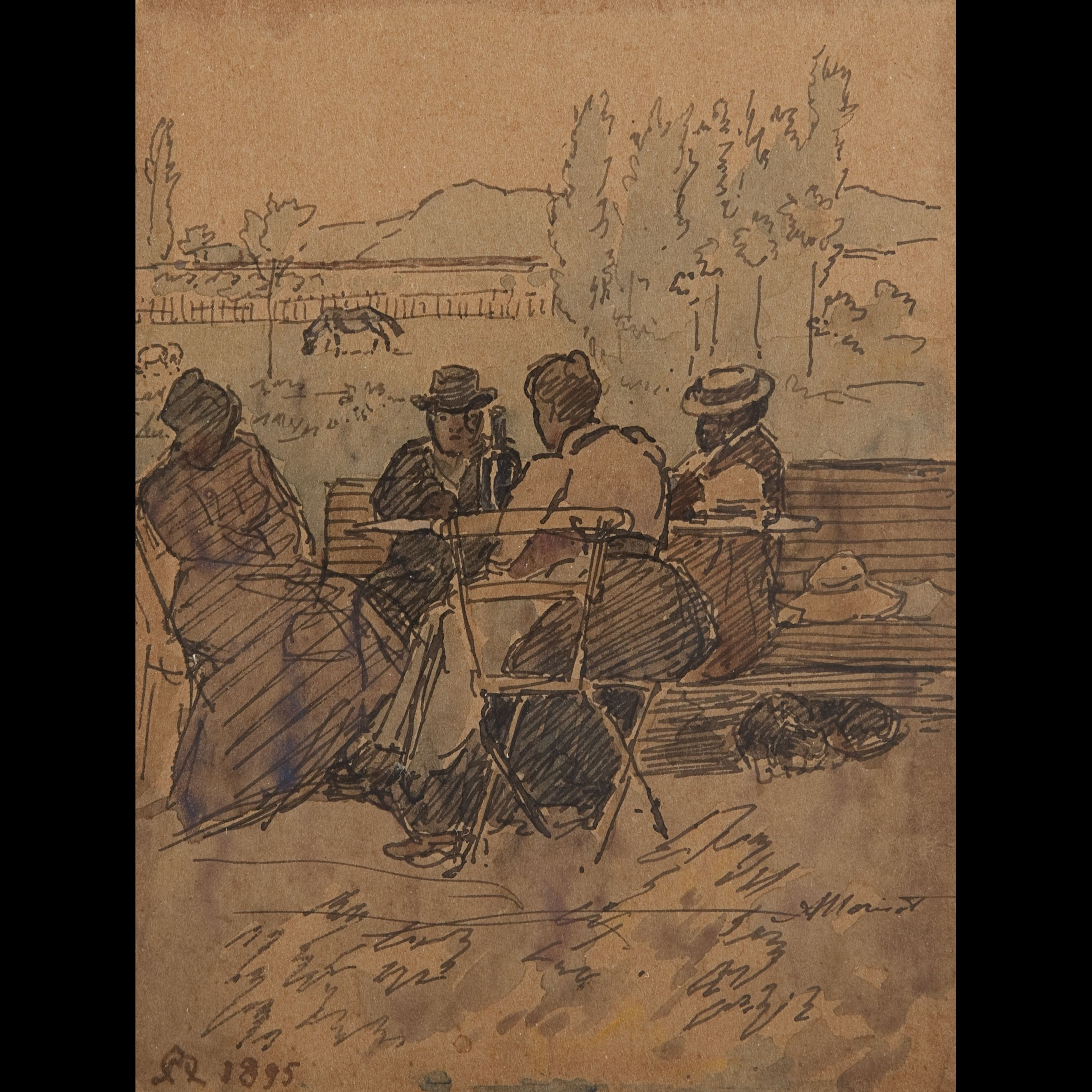 Scène de genre, 1895, Sur le banc